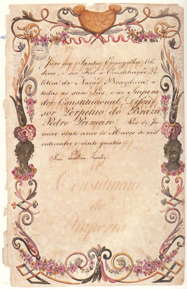 Juramento da imperatriz Maria Leopoldina à Constituição do Brasil, 1824.